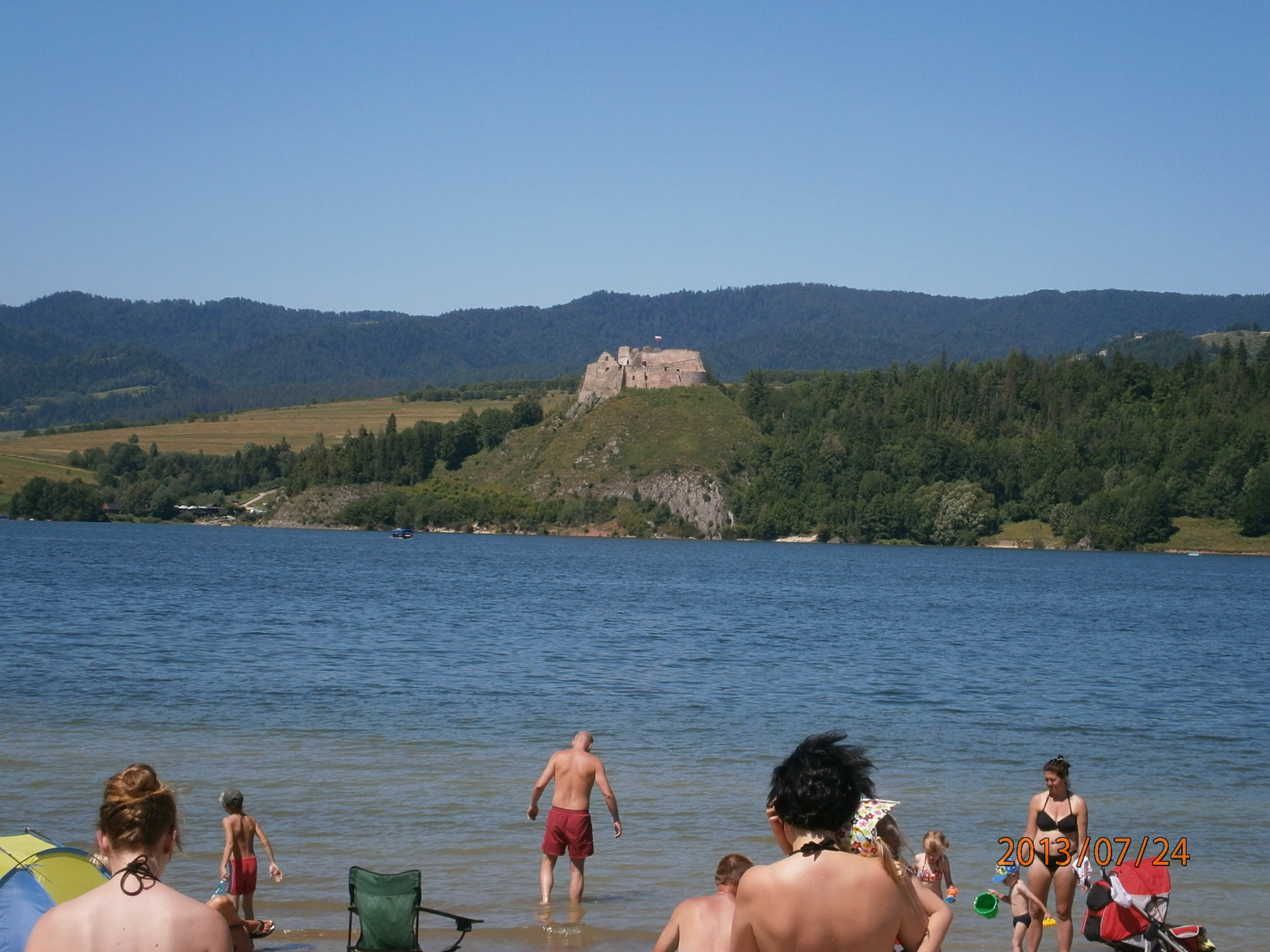 Ruiny w Czorsztynie z plaży nad Jeziorem Czorsztyńskim. Zdjęcie z 2013 roku, z wczasów.